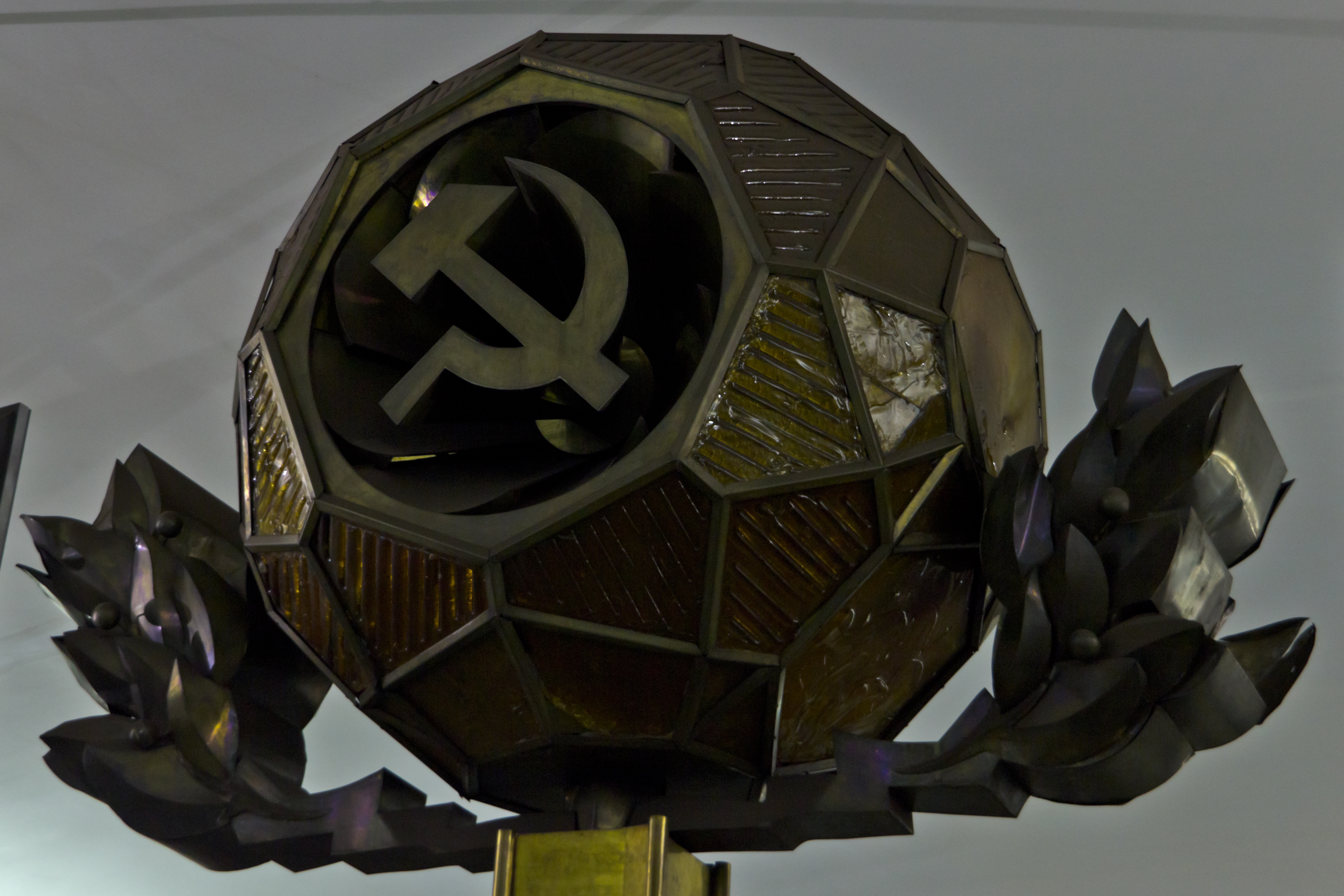 Станция метро «Площадь Ленина», Минск